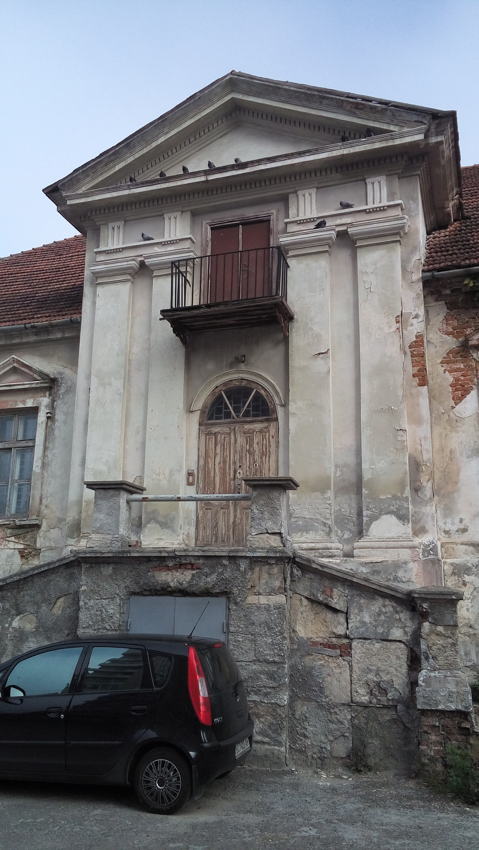 Збоїща